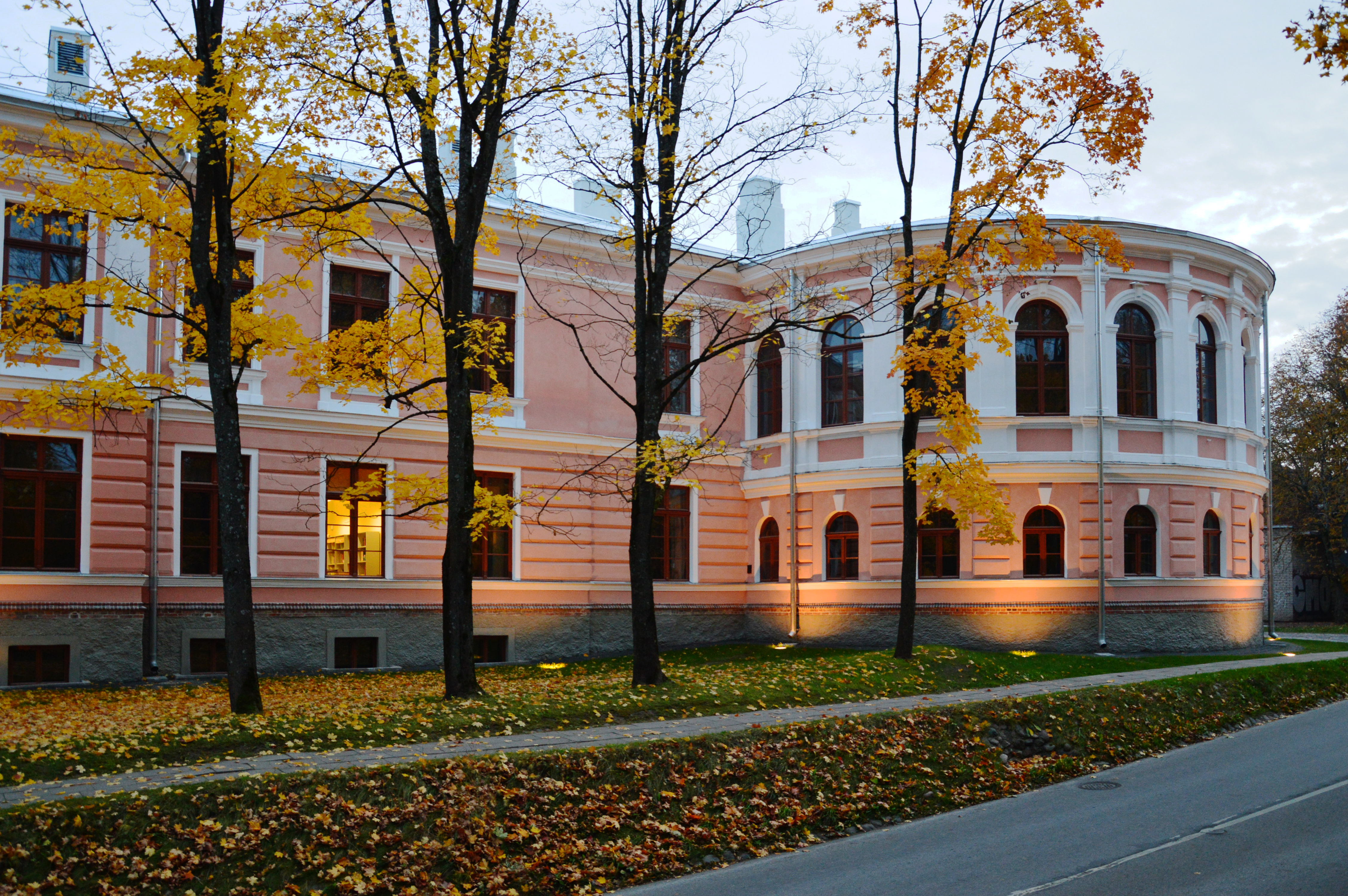 Uus Anatoomikum